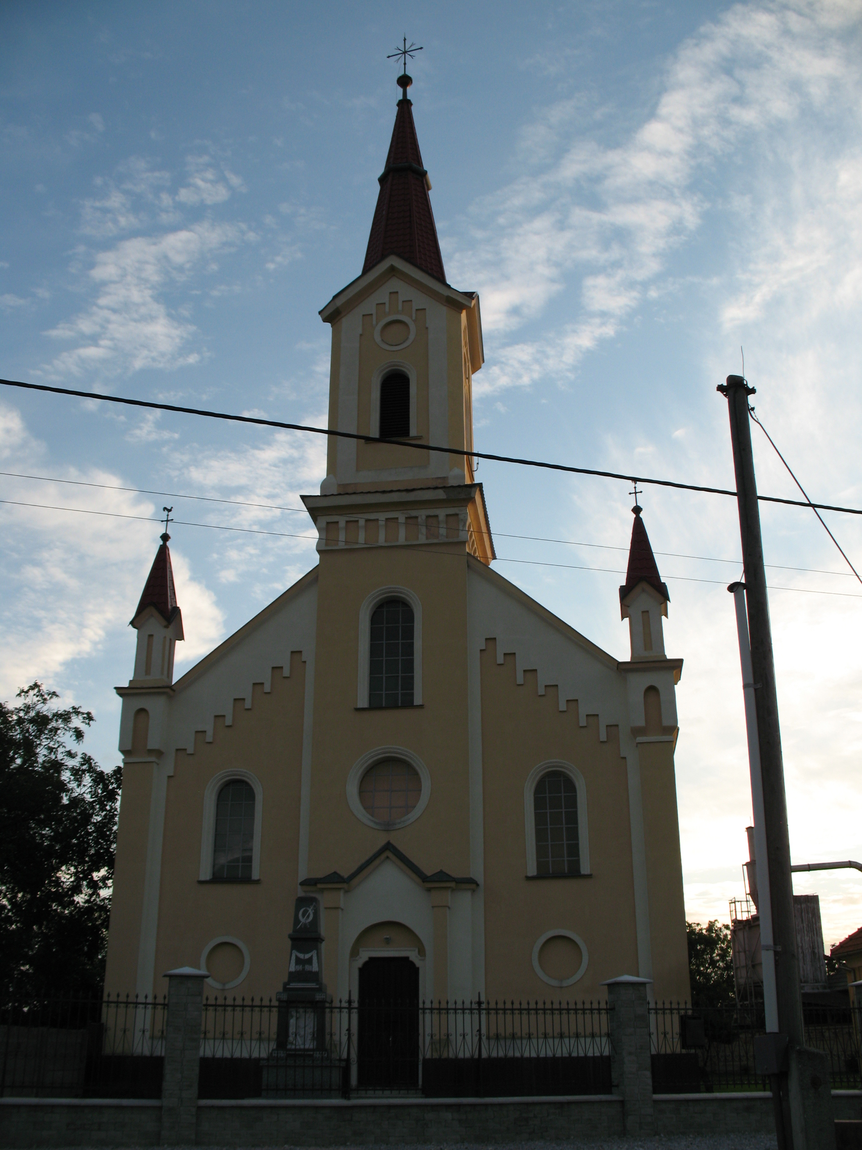 Dolné Saliby - evanjelický kostol